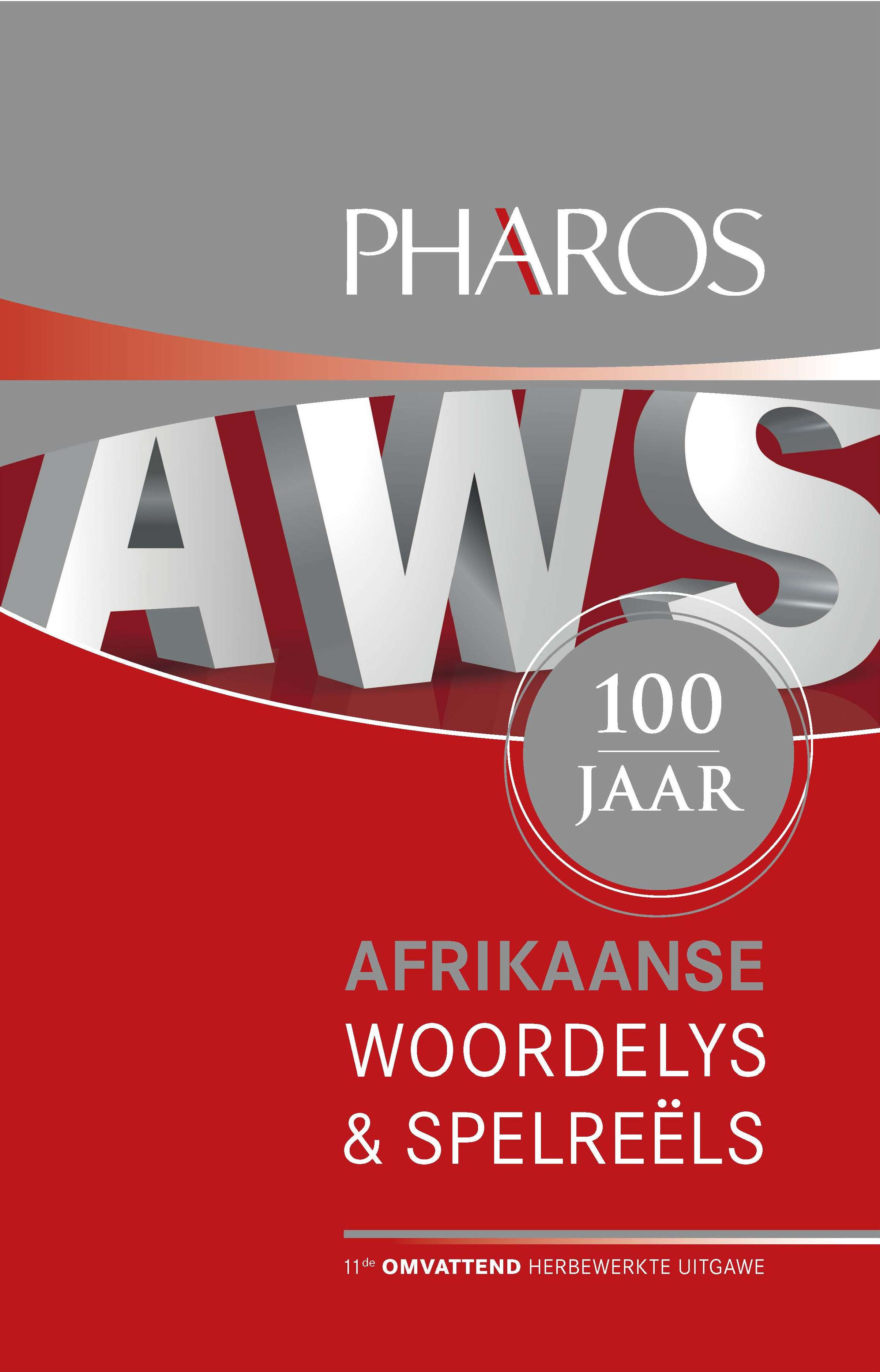 Voorblad van die 2017-AWS